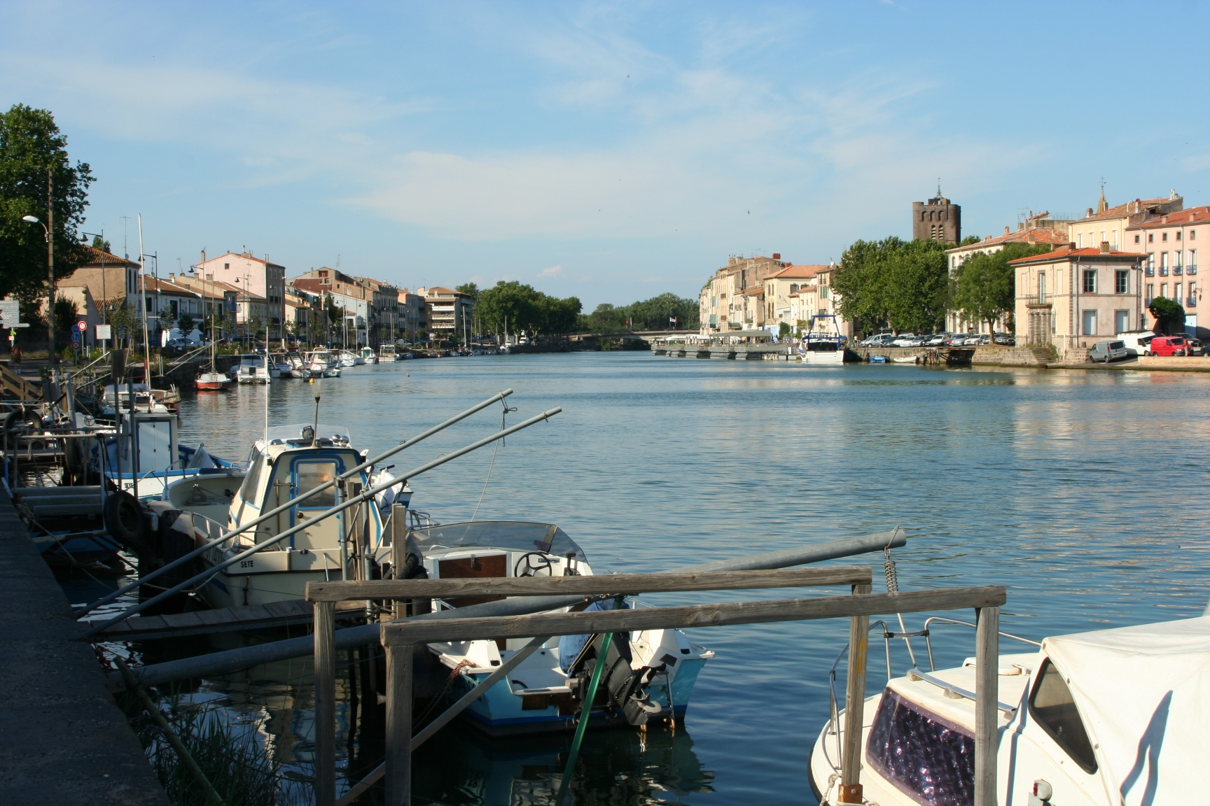 Vue des quais de l'Hérault à Agde (Hérault, France)